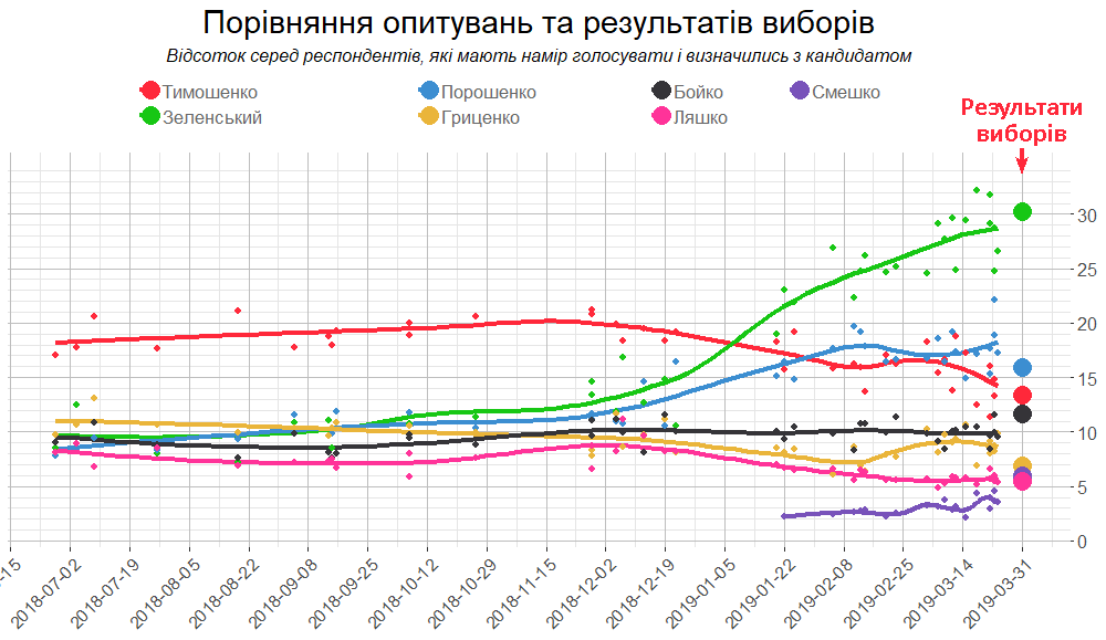 Передвиборчі рейтинги